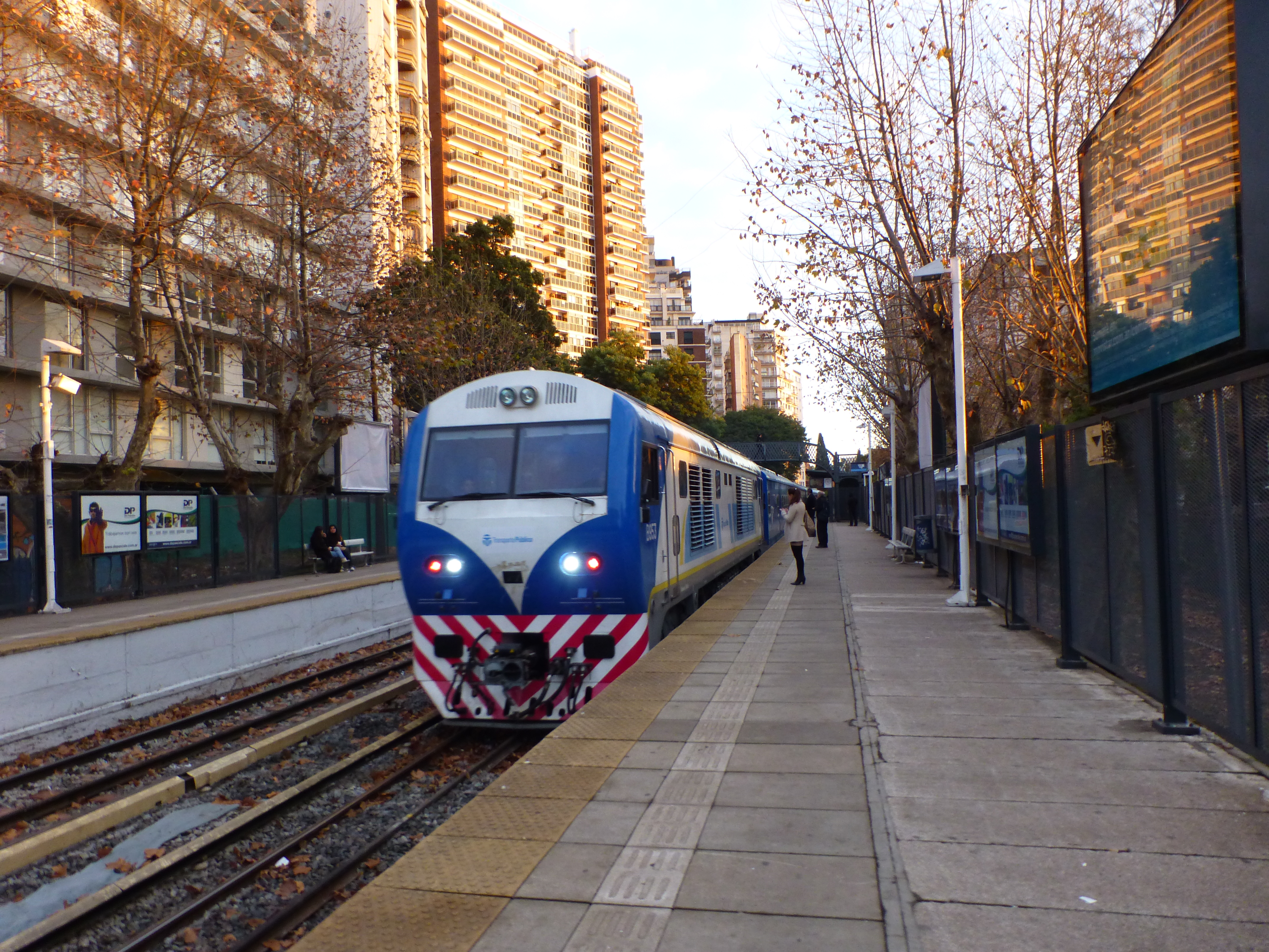 Formación compuesta por locomotora SDD7 y cinco coches de pasajeros fabricados por la estatal china CSR para el FCGSM en servicio de emergencia en el Ferrocarril General Mitre de la red ferroviaria argentina haciendo su ingreso a estación Olivos.